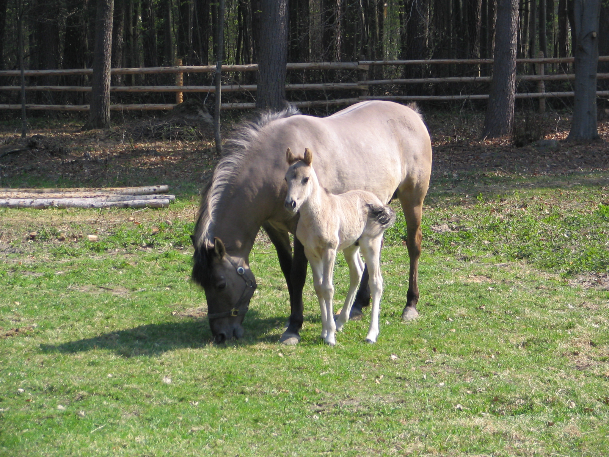 Konik Polski, Roztocze